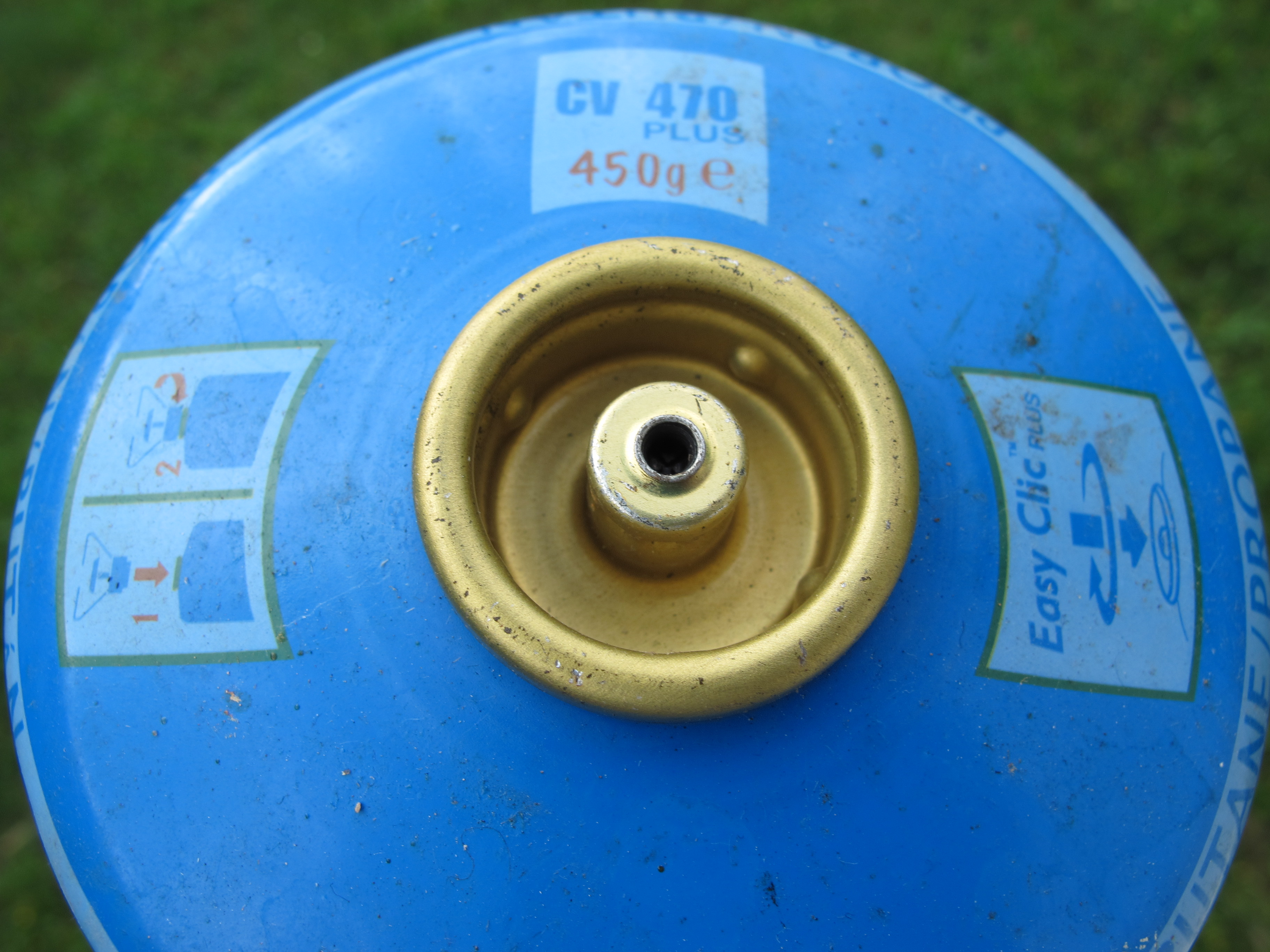 Gaskartusche mit Easy Click-Anschluss